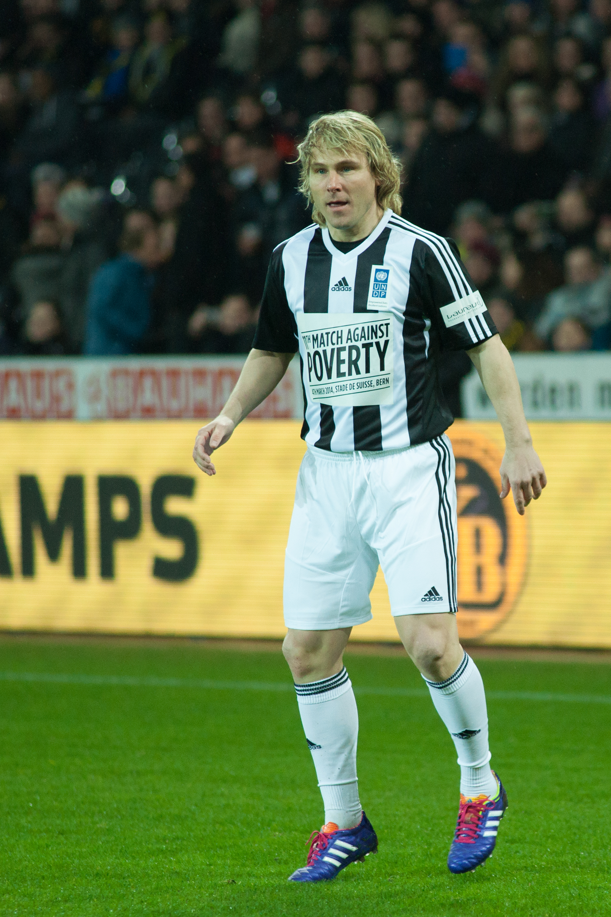 Football against poverty 2014 - Pavel Nedved